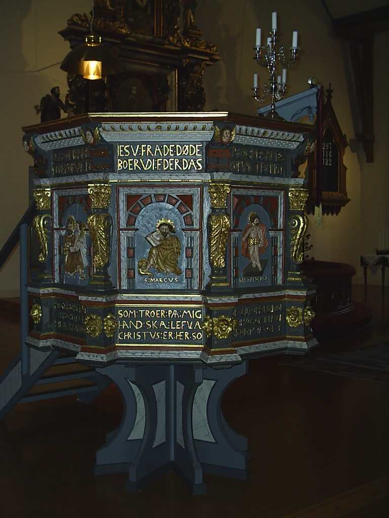 Predikstolen i Tegneby kyrka, Tegneby församling, Orusts kommun. Fotograf:Tubaist